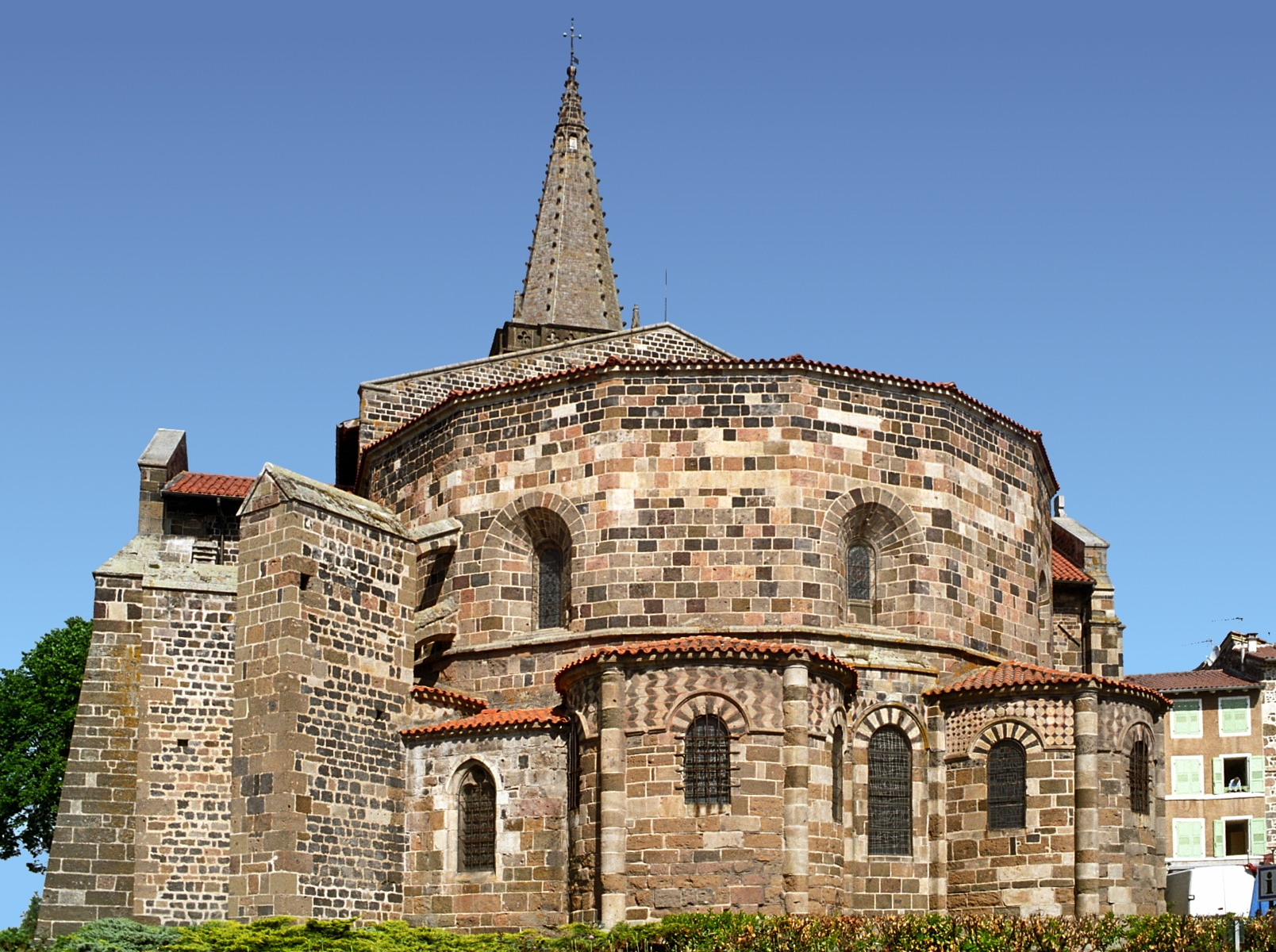 France - Velay - Église Saint-Georges de Saint-Paulien